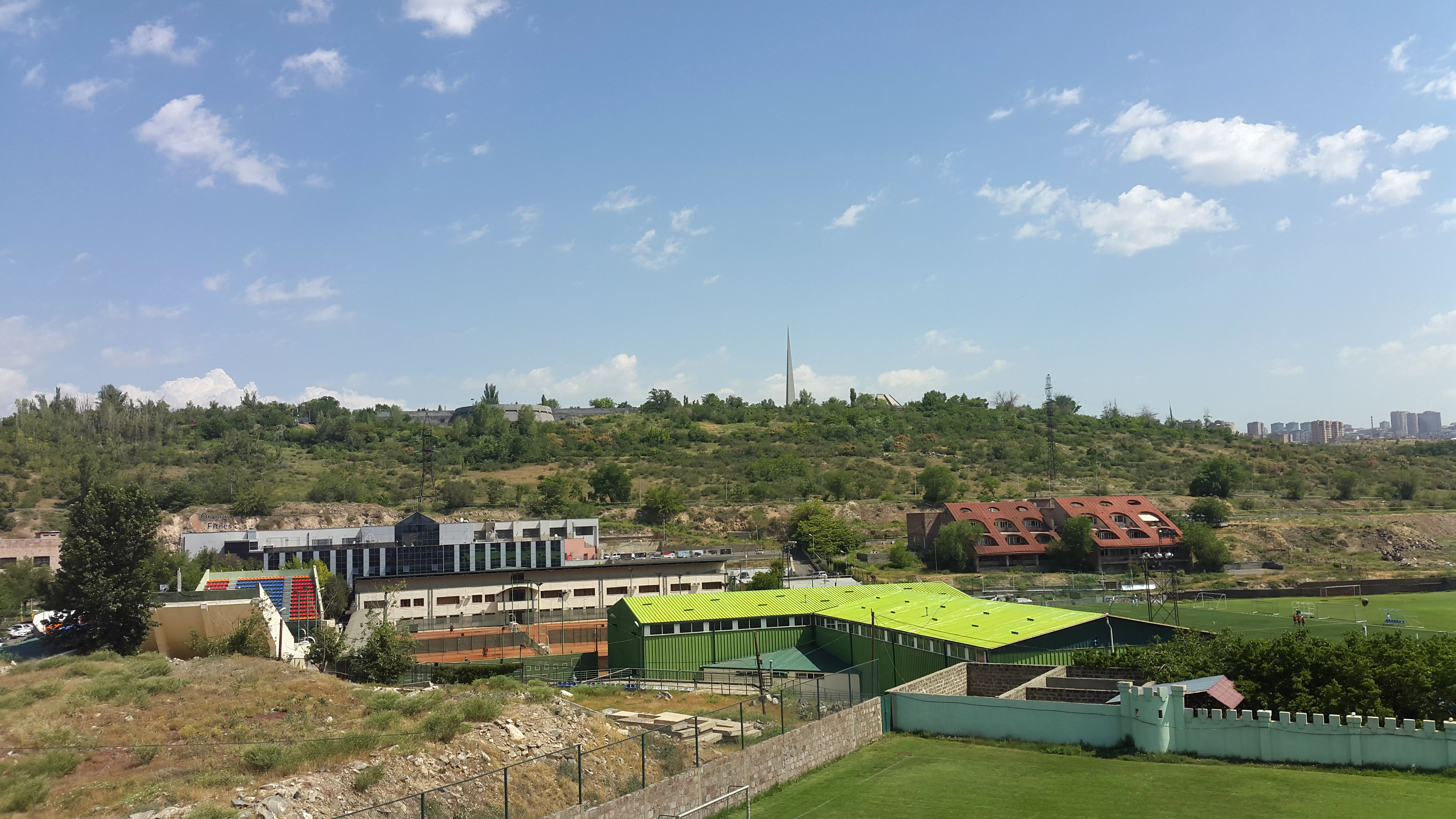 Դալմայի այգիներ